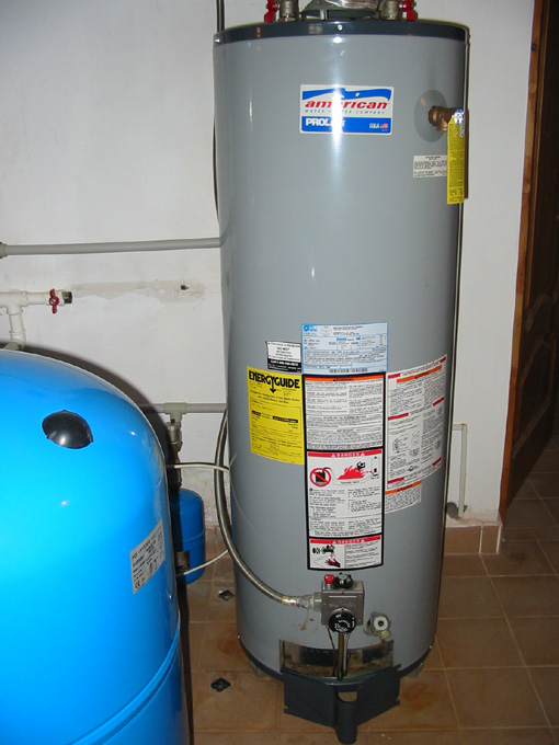 Газовый бойлер производства США